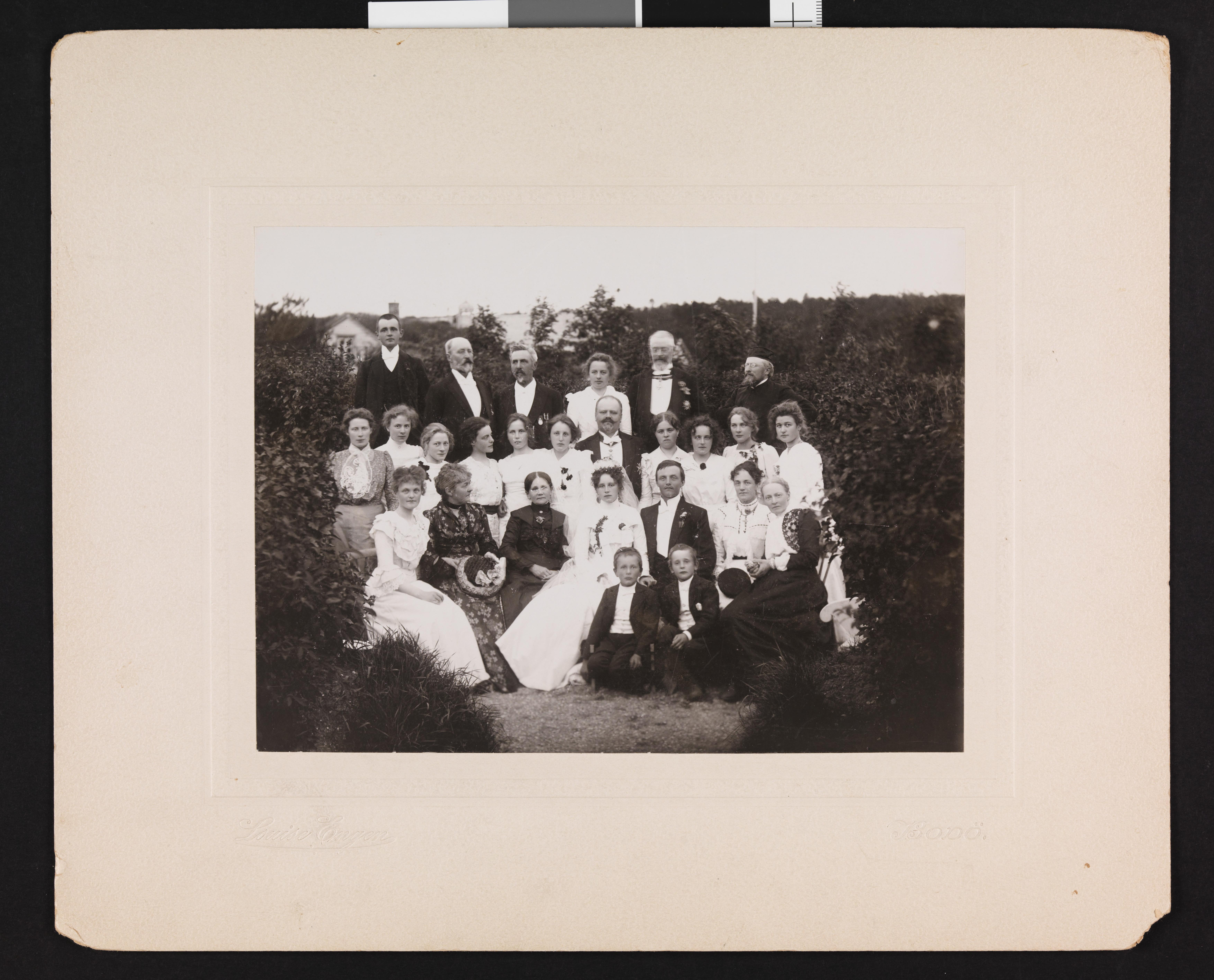 Bildet er hentet fra Nasjonalbibliotekets bildesamling. Anmerkninger til bildet var: Tittel hentet fra påskrift på komponentnr 1 Bodin landbruksskole,Bodø, Bodø, Nordland Depicted person: Anker, Ella Depicted person: Anker, Gudrun Depicted person: Anker, Nils Depicted person: Backe, Anton Sophus Depicted person: Castberg, Karen Kathrine Depicted person: Christie, Anne Sophie Depicted person: Dahl, Rikka Depicted person: Dahl, Simon Depicted person: Konow, Ida Teresia Bojsen Depicted person: Konow, Wollert H. Depicted person: Nilssen, Gunnar Depicted person: Nilssen, Lorentz Peter Depicted person: Nilssen, Marie Louise Depicted person: Nørregaard, Eva Agnes Anker Depicted person: Pharo, Einar Nilssen Depicted person: Wexelsen, Ingrid Depicted person: Wexelsen, Vilhelm Andreas